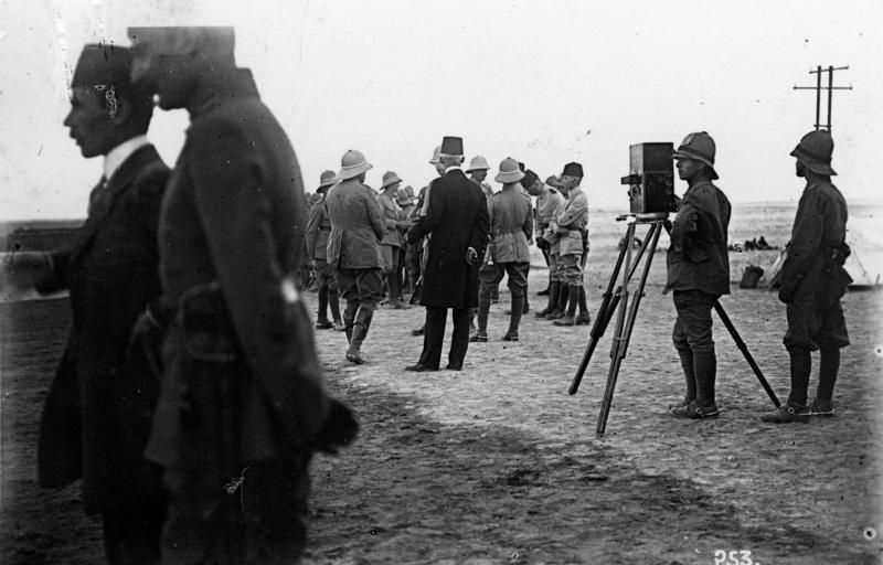 Ras-el-Ain, Offiziere der Palästinamission Ras-el-Ain (Syrien), Nähe Euphrat (damaliges Ende der Bagdad-Bahn), Mai 1916 Deutsche Offiziere der Sondermission Palästina erwarten Ankunft des Sarges mit dem verstorbenen Generalfeldmarschall von der Goltz-Pascha (+19.4.1916 in Bagdad). An der Prévast-Filmkamera: Unteroffizier Werner Brandes (am 10.3.1916 zur Sondermission abkommandiert), aufgenommen von einem Foto-Berichterstatter-Kameraden